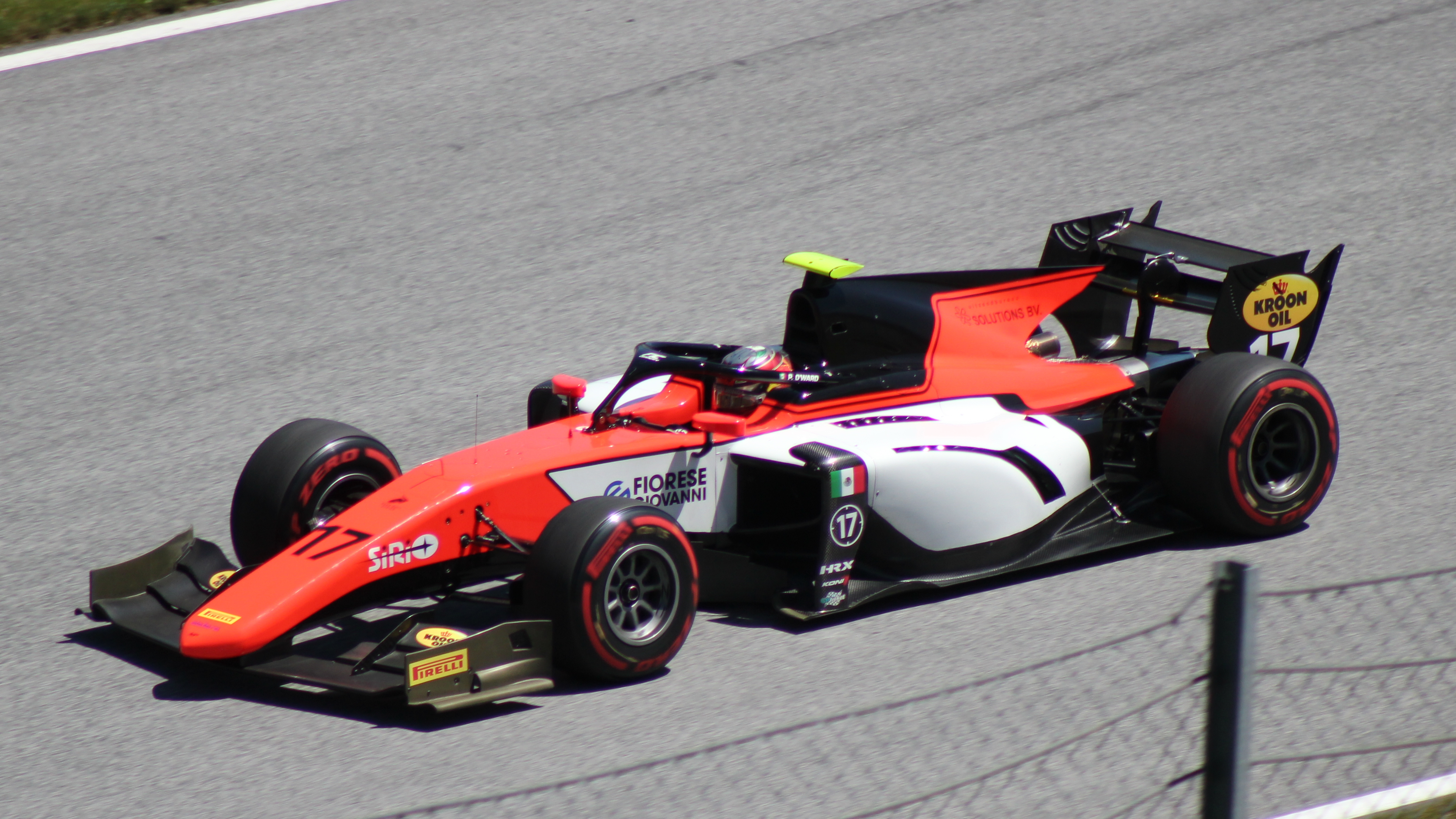 O'Ward beim Rennwochenende in Österreich 2019